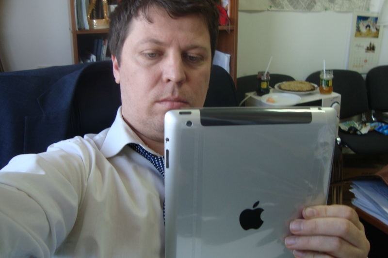 Михаил Матвеев